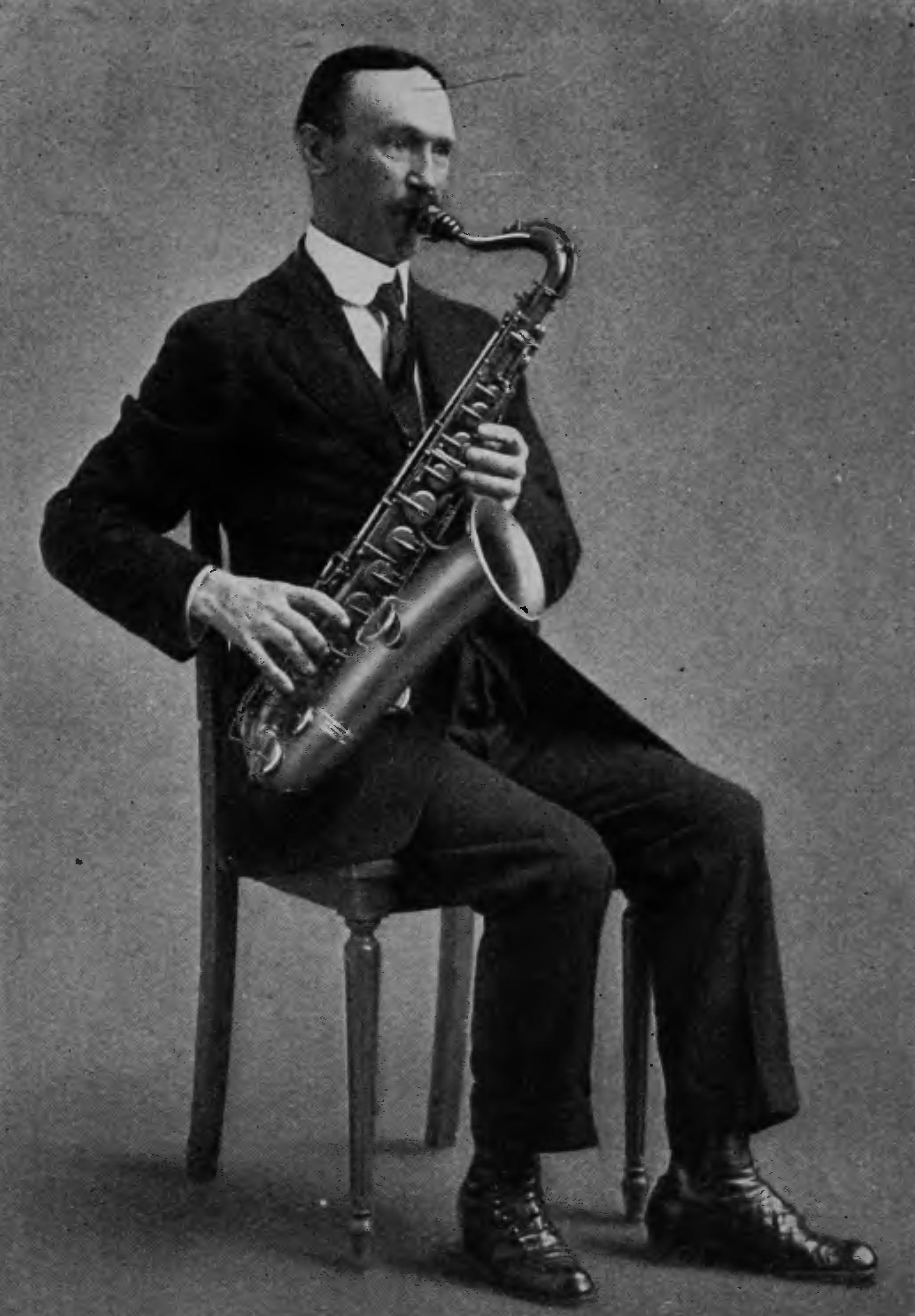 Ben VereeckenSousa's Band